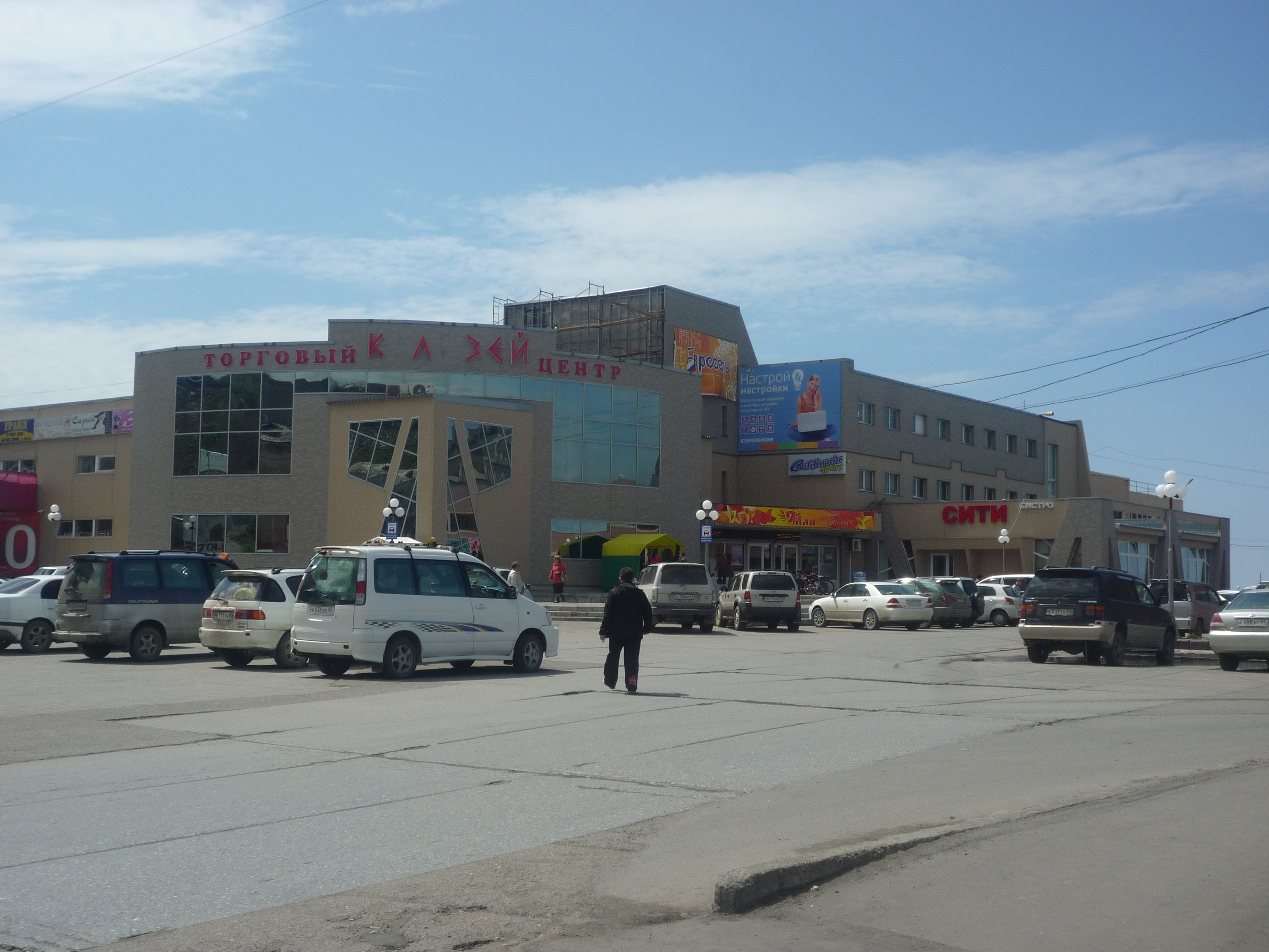 ТЦ Колизей (Холмск)